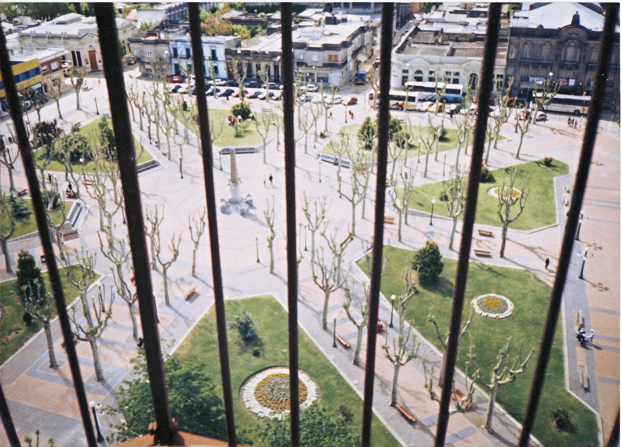 vista aérea de la plaza 33 orientales desde la torre de la iglesia